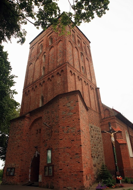 Srokowo – wieś w województwie warmińsko-mazurskim, w powiecie kętrzyńskim, w gminie Srokowo. Kościół Parafialny pw. św. Krzyża